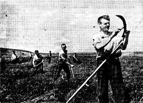 Сенокос в Молдавии. На снимке: уборка люцерны в колхозе имени Ленина (Оргеевский район). На переднем плане — колхозник Пётр Бакарук.